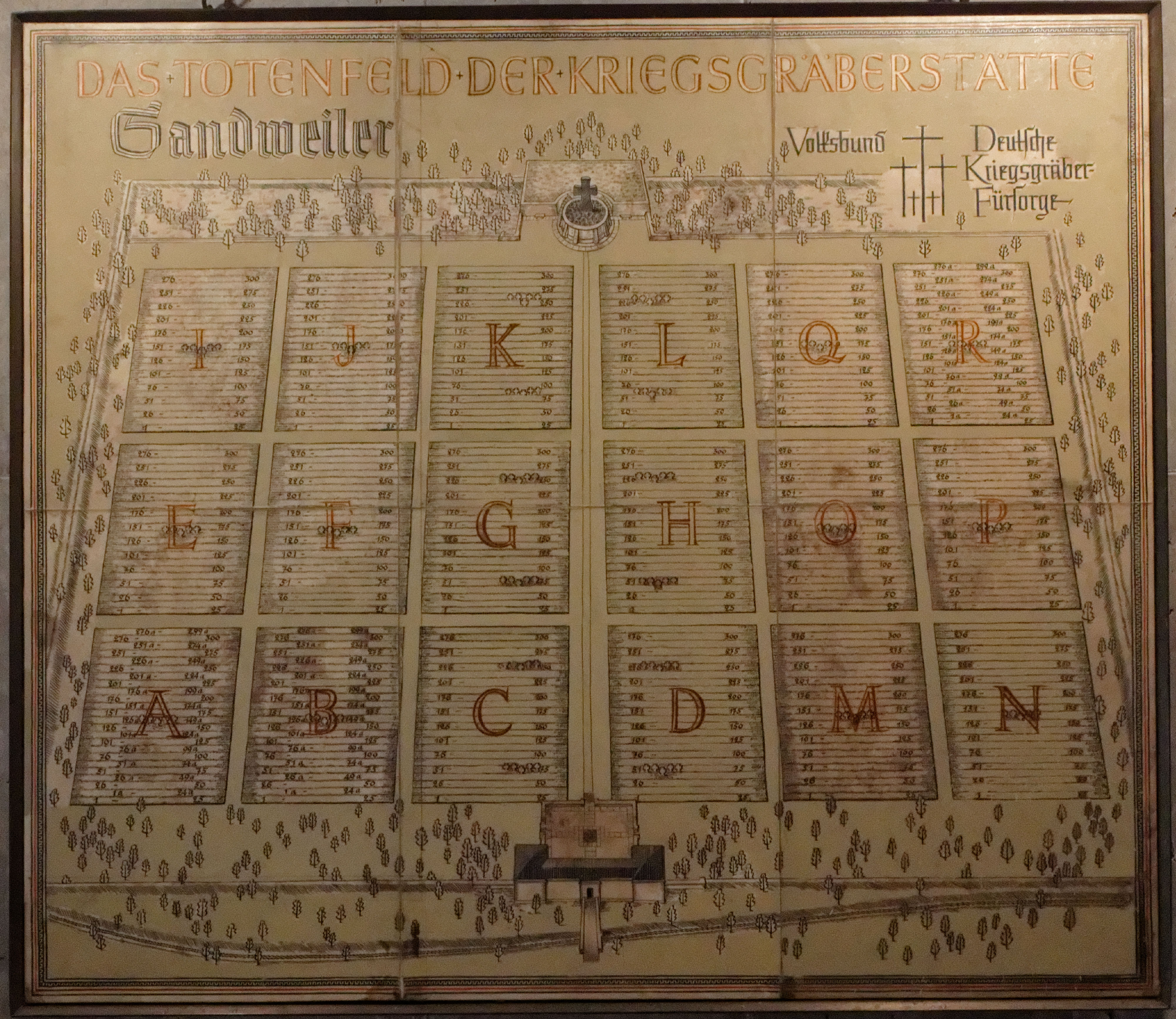 Deutscher Soldatenfriedhof in Sandweiler, Luxemburg Gräberfeld